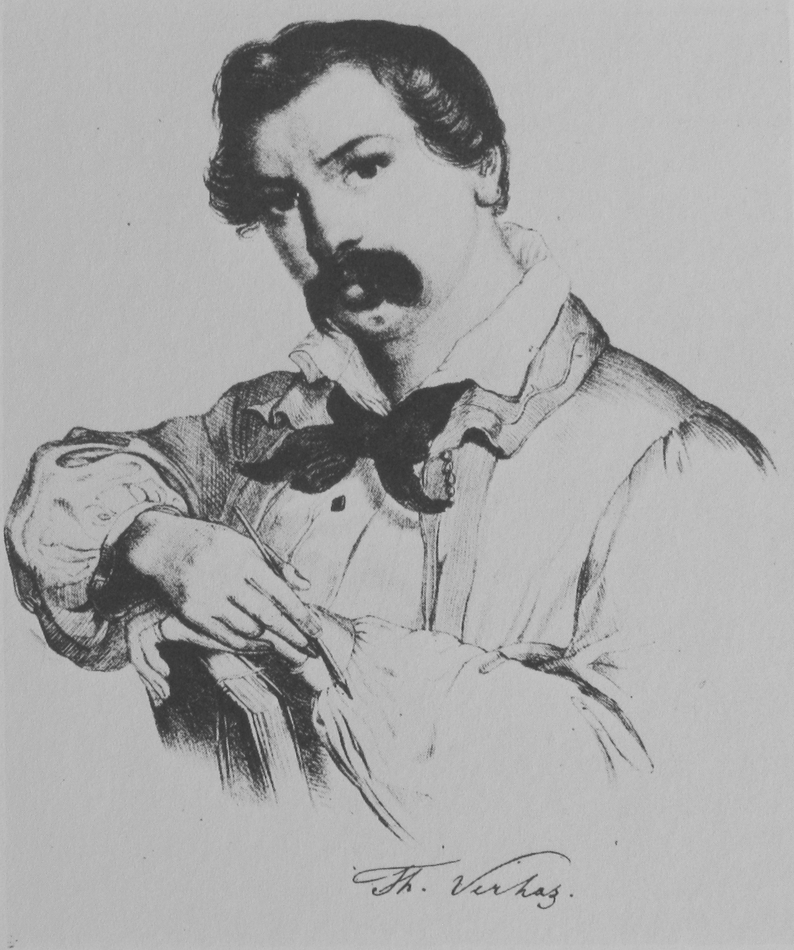 Der Maler Theodor Verhas, Selbstbildnis (?)